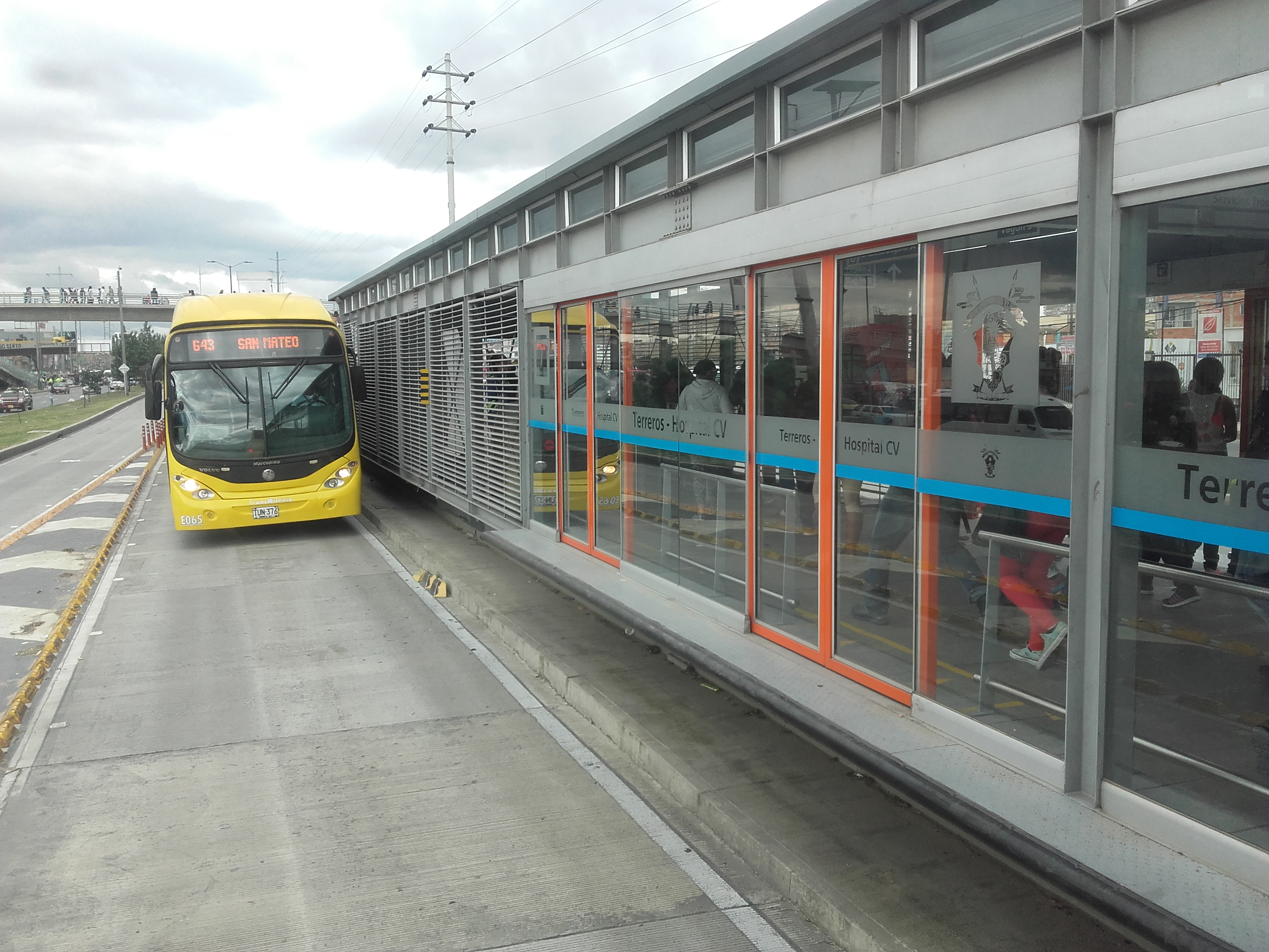 memekekdkdldmmd